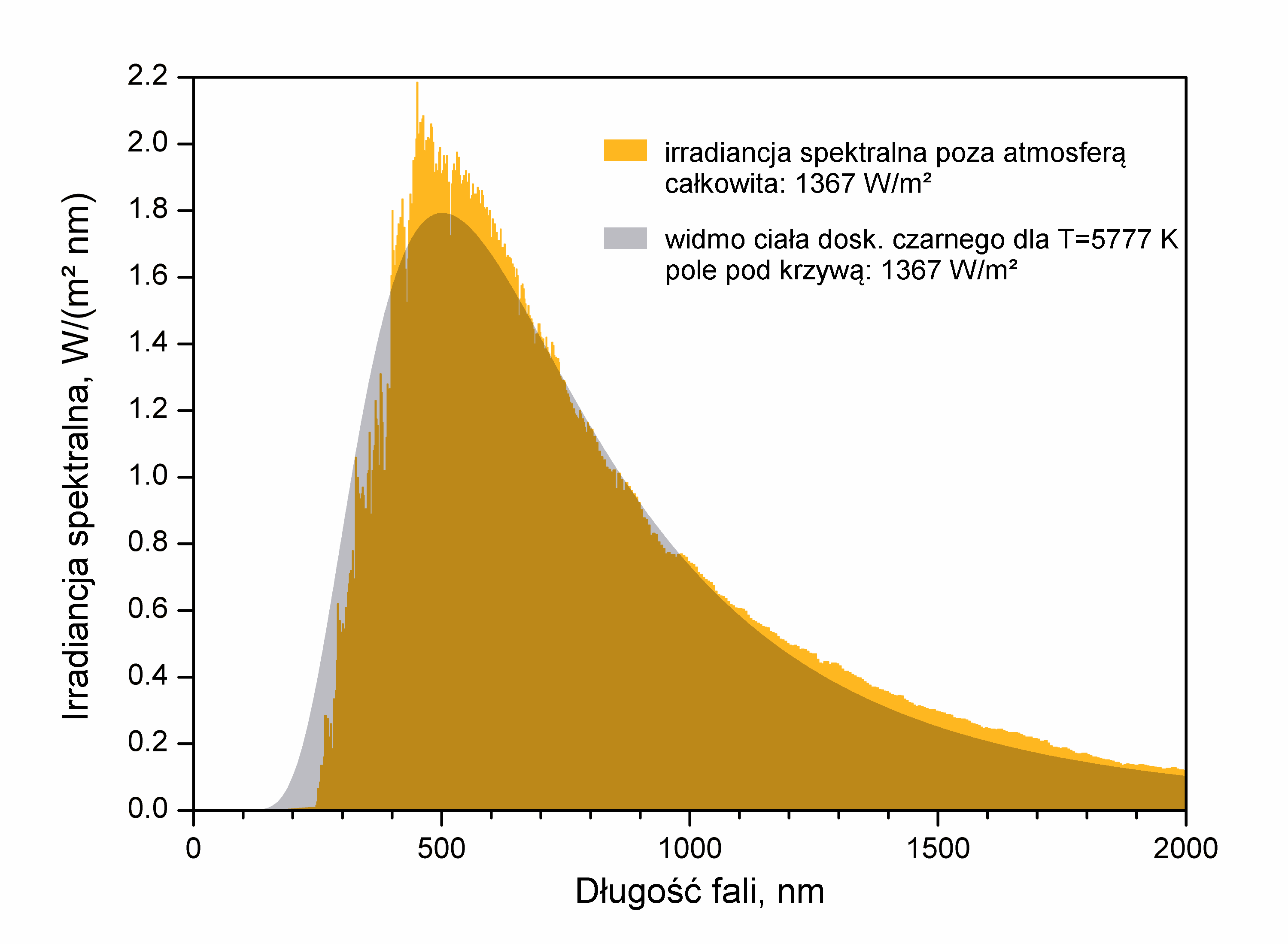 Irradiancja spektralna poza atmosferą w funkcji długości fali.